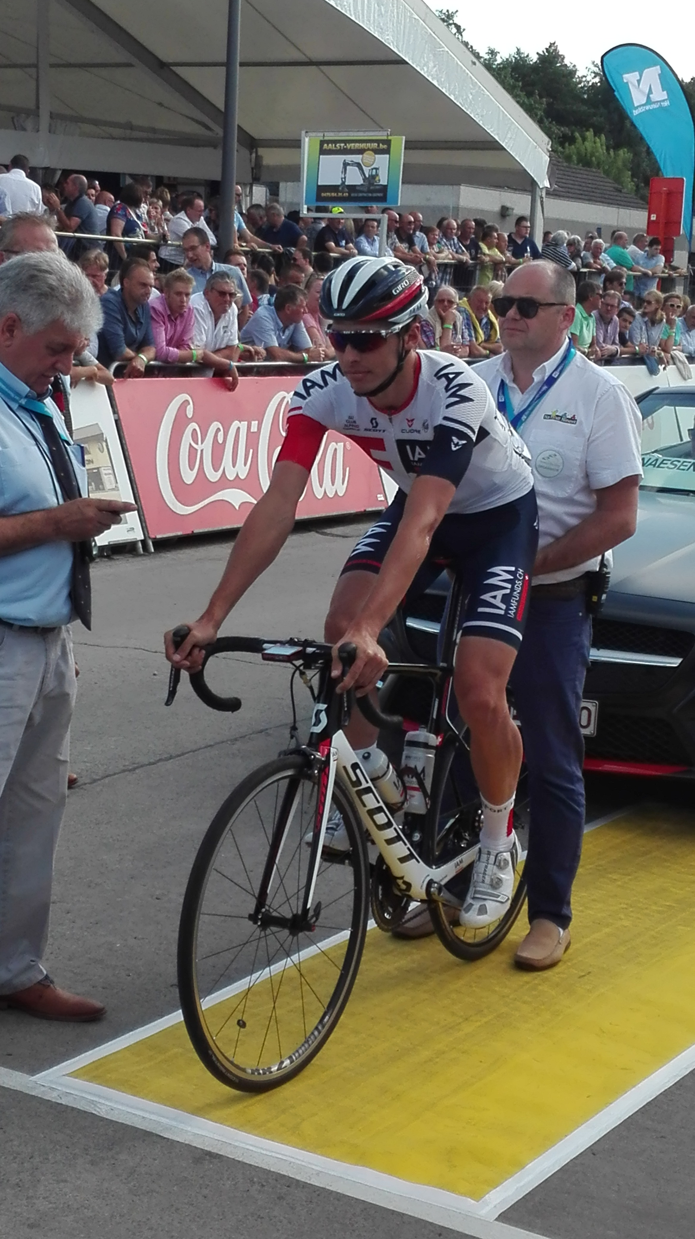 Oliver Naesen tijdens het Na-Tourcriterium in Ninove